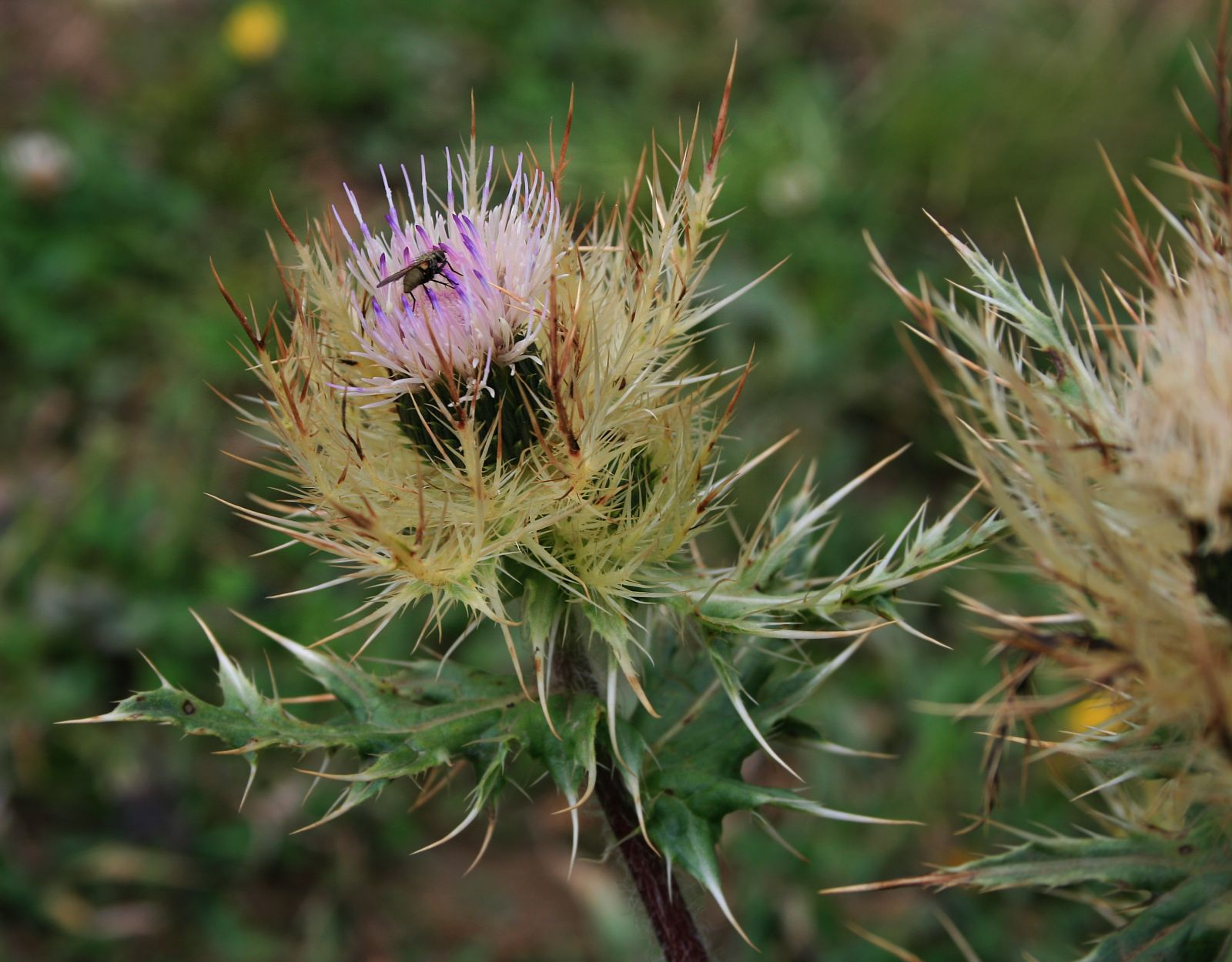 Cirsium obvallatum, Korbblütler (Asteraceae) – Georgien/საქართველო: Kleiner Kaukasus, Pass zwischen Tsikhisjvari/ციხისჯვარში und Sakire/საკირე, ca. 12,5 km SSW Borjomi/ბორჯომი, ca. 2170 m s.m.